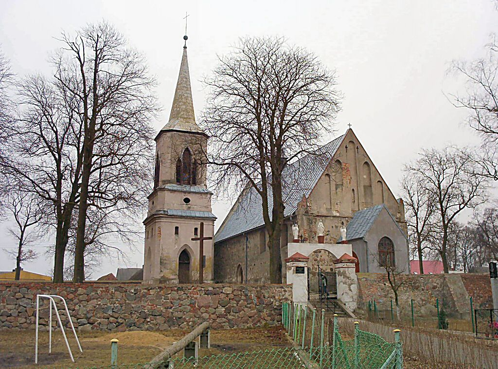 Kościół w Brzesku koło Pyrzyc